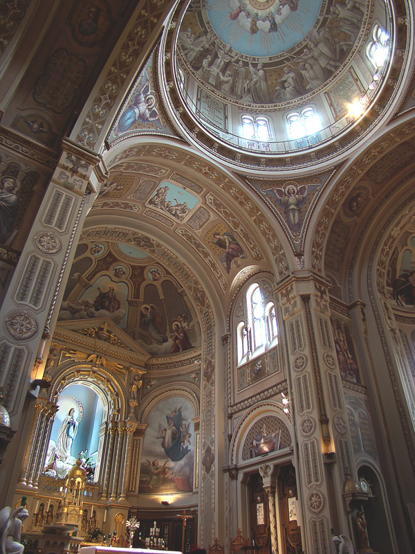 Chapelle Notre-Dame-de-Lourdes, Montréal, Québec, Canada.